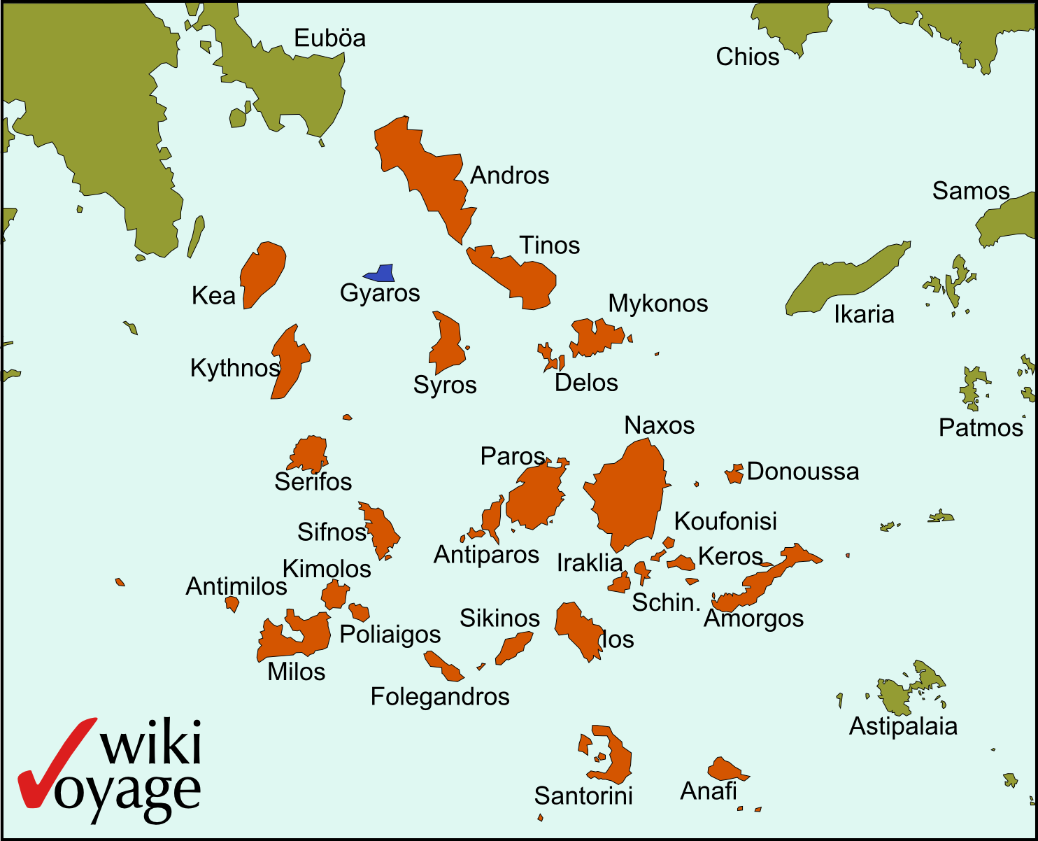 Lage der Insel Gyaros in den Kykladen